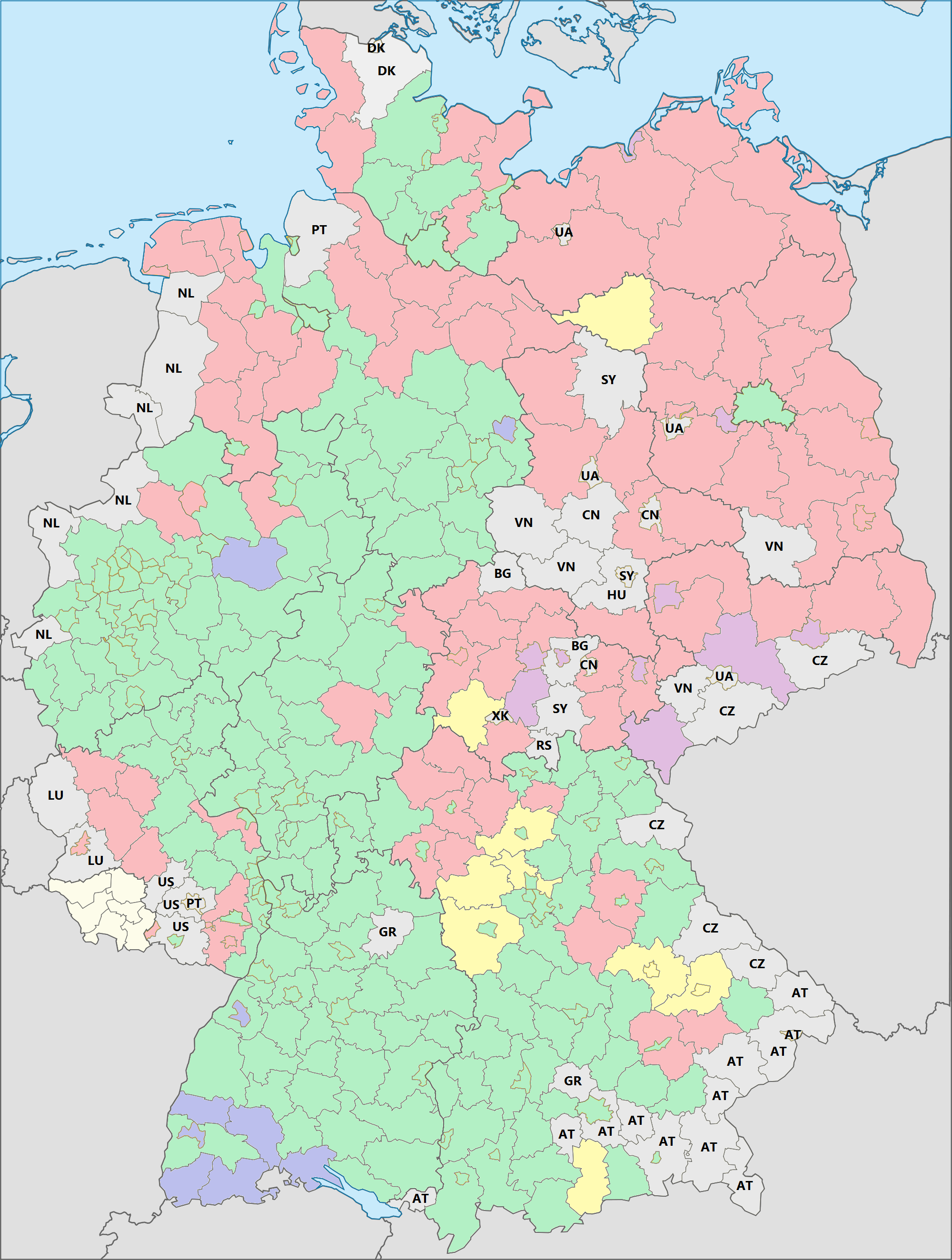 Karte der Landkreise in Deutschland mit der jeweils größten ausländischen Bevölkerungsgruppe nach Herkunkftsland. Grün: Türkei Rot: Polen Blau: Italien Gelb: Rumänien Lila: Russland Grau: andere DK - Dänemark NL - Niederlande LU - Luxemburg US - Vereinigte Staaten PT - Portugal GR - Griechenland AT - Österreich CZ - Tschechien UA - Ukraine VN - Vietnam RS - Serbien XK - Kosovo SY - Syrien CN - China BG - Bulgarien HU - Ungarn Aus dem Saarland lagen keine Daten vor.